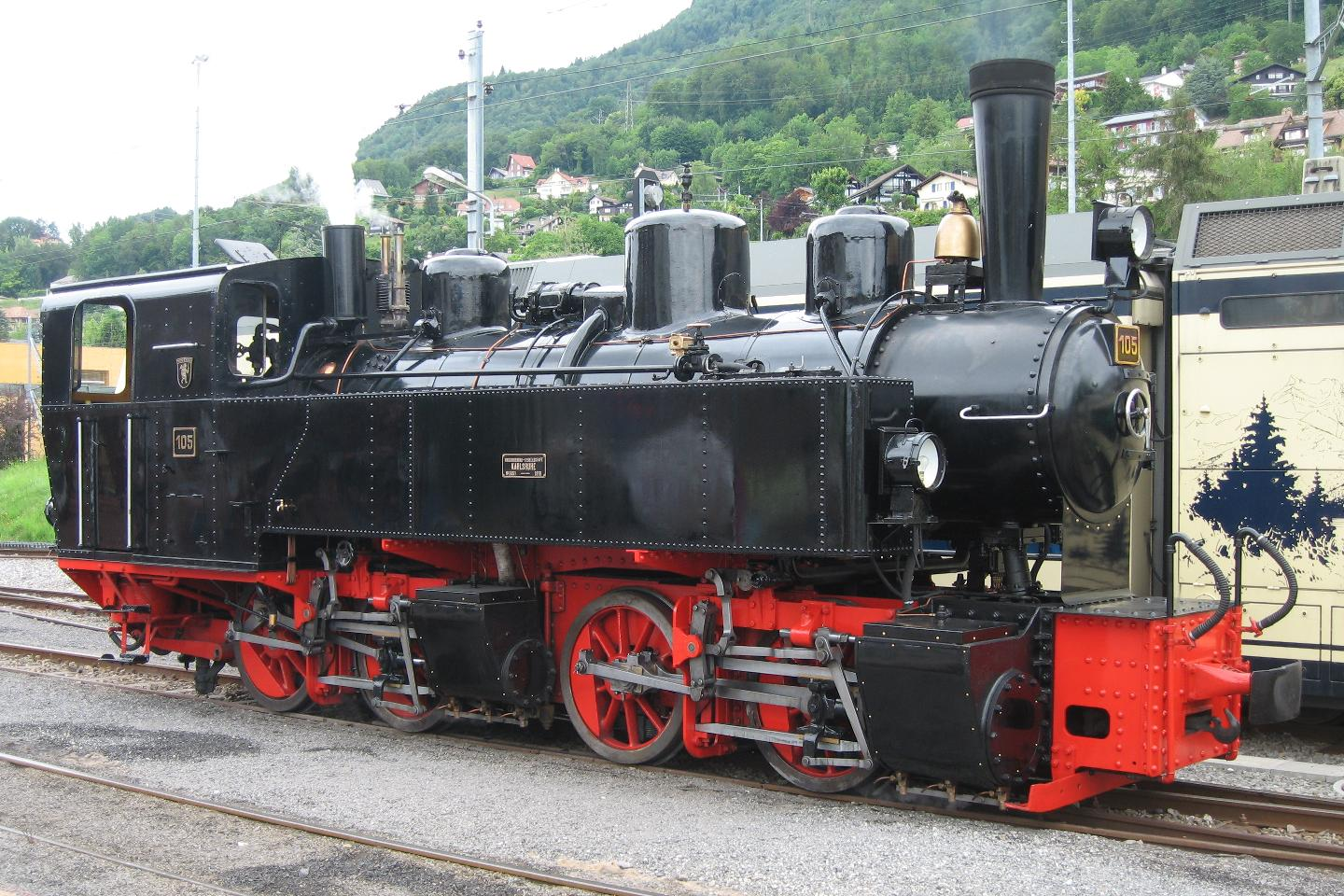 Mallet Dampflokomotive G 2x2/2 105 Todtnau der ehemaligen Südwestdeutsche Eisenbahn-Gesellschaft (SEG), von der Bahnstrecke Zell im Wiesental–Todtnau, bei der Museumsbahn Blonay-Chamby in Blonay, im Frühling 2011.